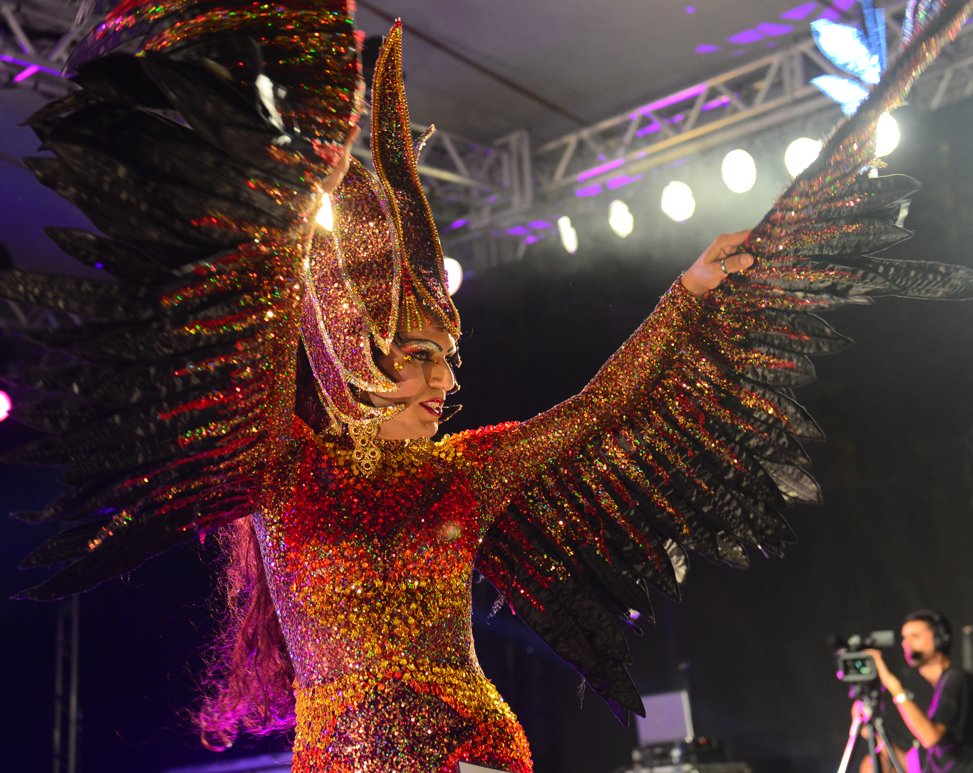 Concurso Pop Gay no Carnaval de 2014 de Florianópolis.